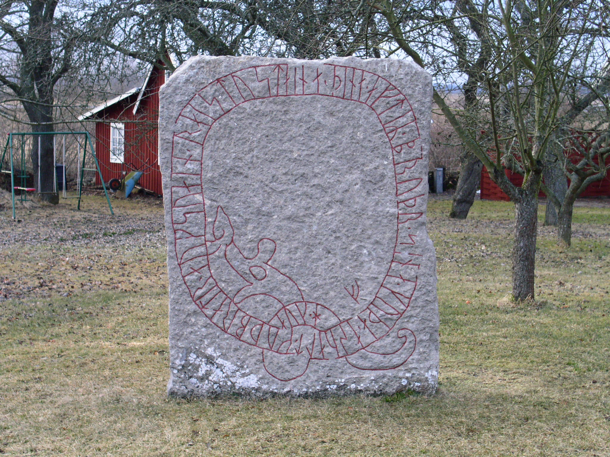 Den norra runstenen (Öl 40) i Övra Bägby, Gärdslösa socken, Öland